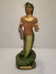 Es la representación, la unión entre la tierra y el cielo, su equilibrio, balancea la unión entre los hombres y los Orishas, es andrógino, este doble aspecto se hace presente en los colores rojo masculino y azul femenino.